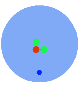 Isotopenmodell Tritium